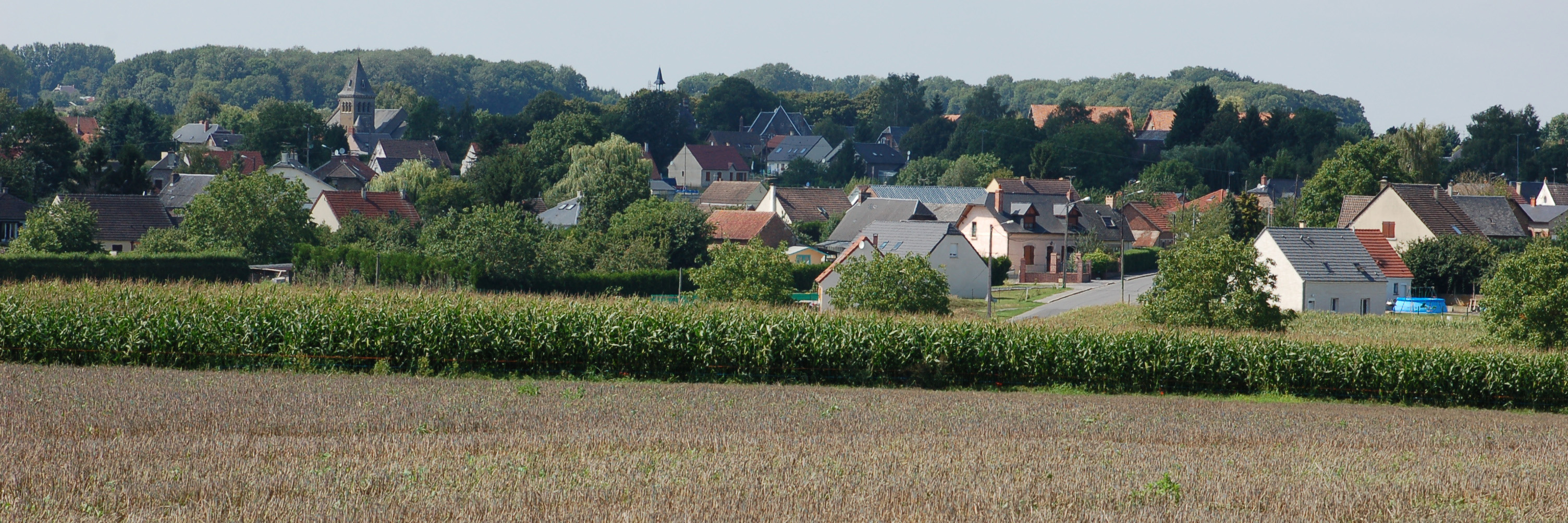 Vue du village de Frières-Faillouël (France, Aisne) avec son église et sa mairie.